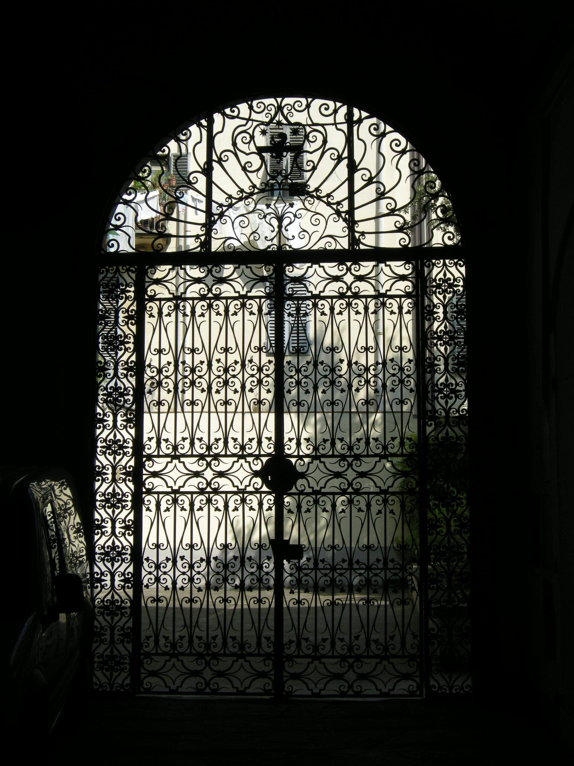 Palazzo strozzi di via ghibellina, cancellata